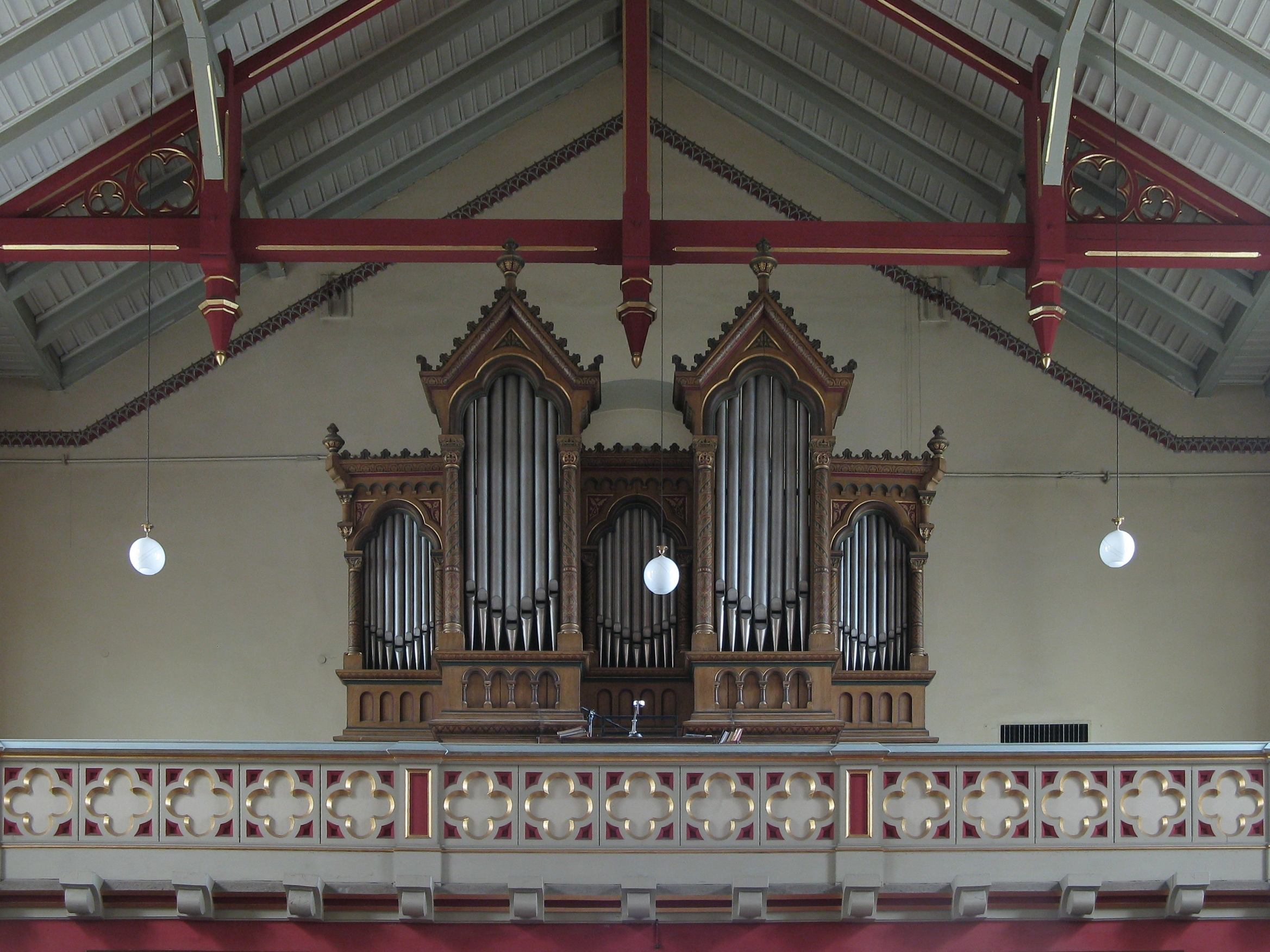 Kościół św. Jana Nepomucena w Bytomiu-Łagiewnikach, empora z organami, widoczna ozdobna drewniana więźba.